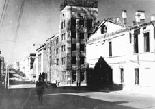 Белкамунбанк